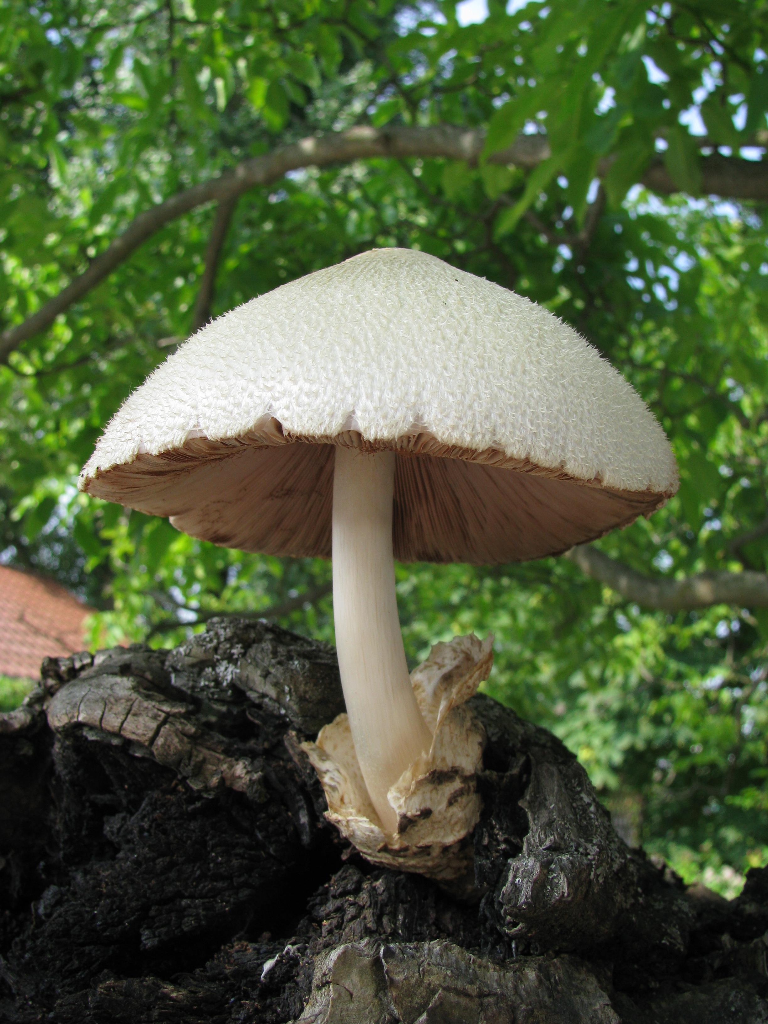 Wolliger Scheidling (Volvariella bombycina) auf Walnussbaum, Fundort: Ingelheim, Deutschland